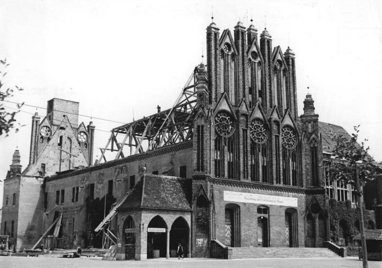 Frankfurt/Oder, Rathaus, Trümmer Zentralbild Klein Ho. 19.7.1951 Wiederaufbau des Frankfurter Rathauses Das Rathaus der Stadt Frankfurt-Oder wurde im 2. Weltkrieg bis auf den Südgiebel zerstört. Im Jahre 1951 wurde mit den Wiederaufbauten begonnen. UBz: Das Rathaus der Stadt Frankfurt-Oder während der Aufbauarbeiten.